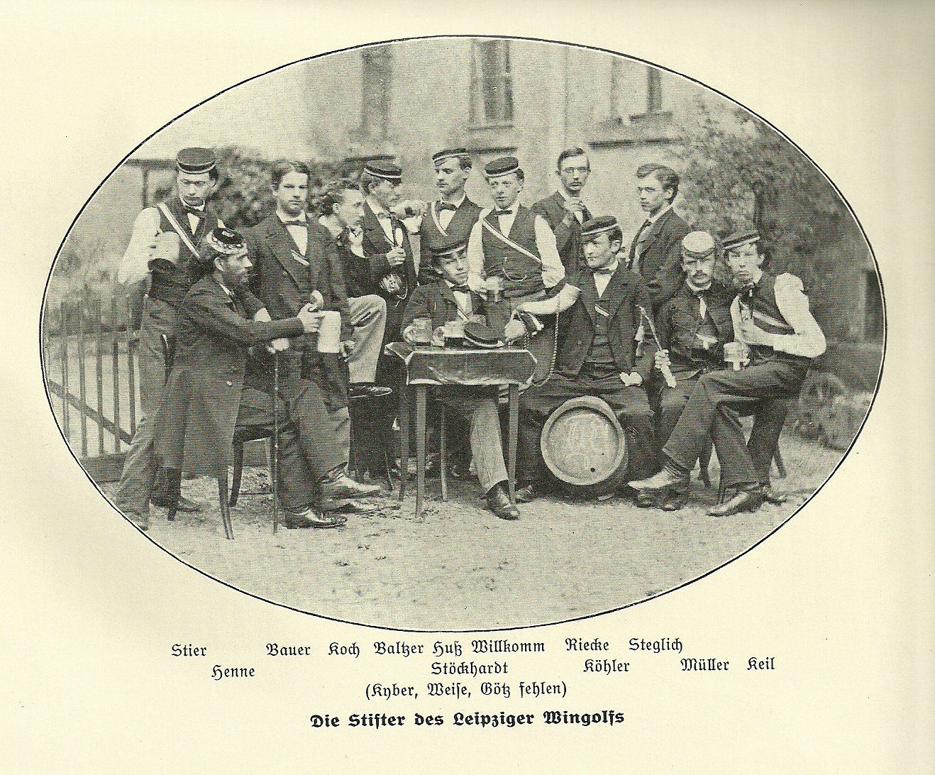 Stifter des Leipziger Wingolfs 1865